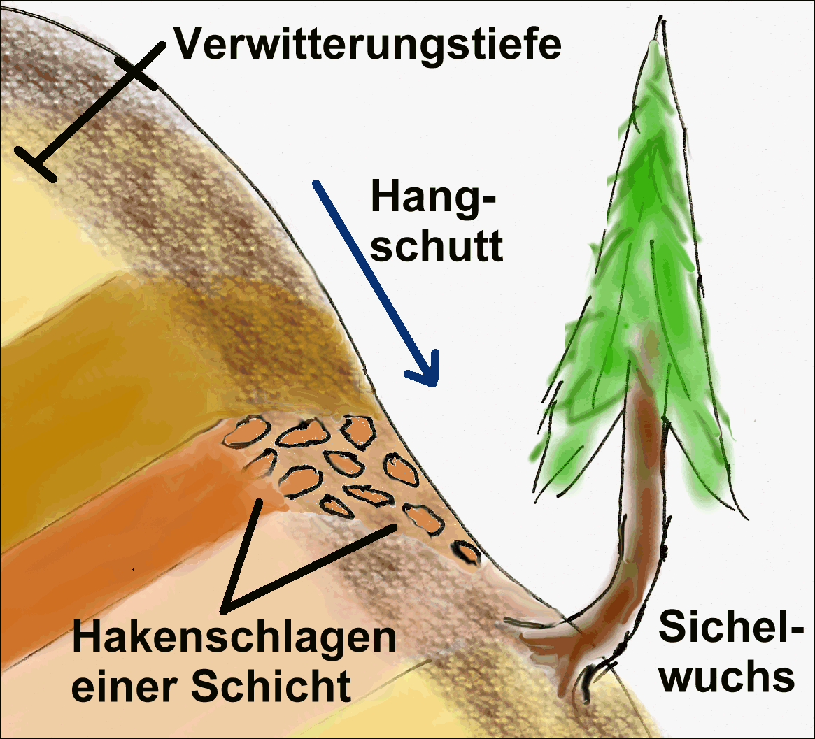 Geomorphologie: Hakenschlagen und Sichelwuchs.